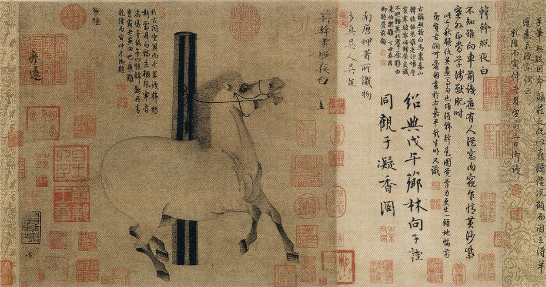 Attribué à Han Gan, Lumière éclairant la nuit, rouleau portatif, encre et couleurs sur papier, 30,8x33,5cm. 706-783. Métropolitan Museum of Art, New York. (Fond dillon, 1977).